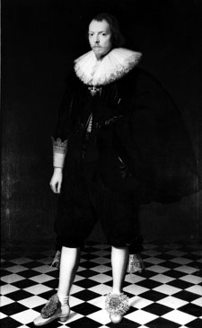 Frans Banning Cocq (1605-1655), heer van Purmerland en Ilpendam, burgemeester van Amsterdam